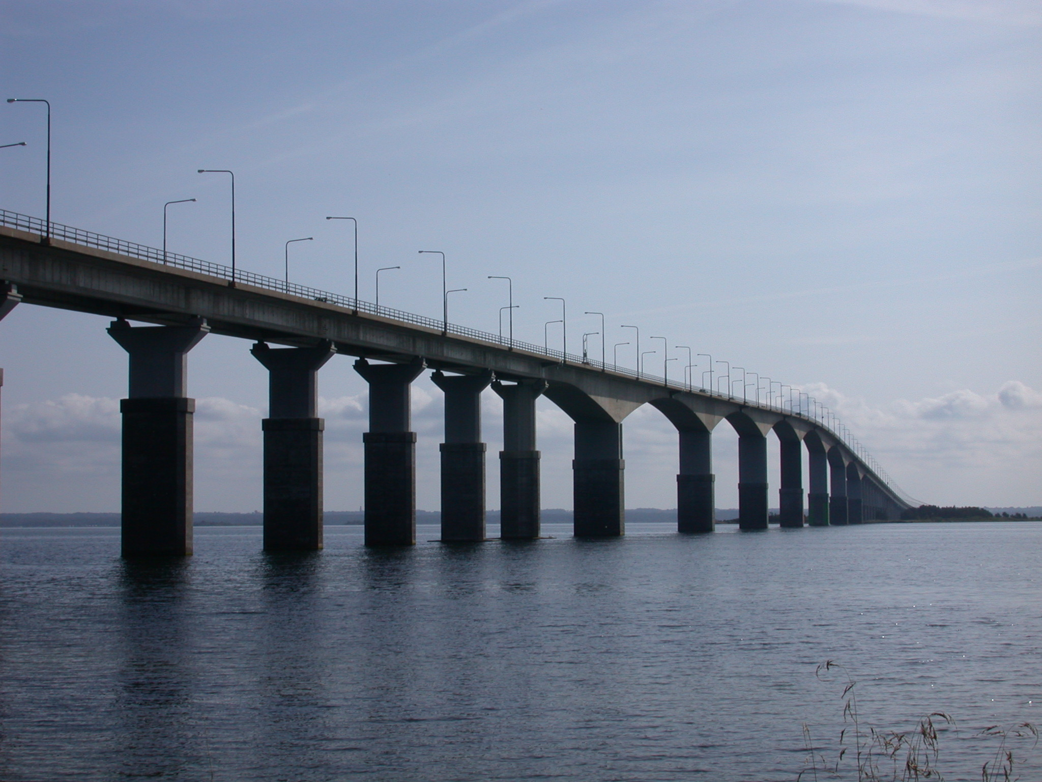 närbild av ölandsbron slutet på sommaren 2005, tagen från stranden på kalmarsidan.